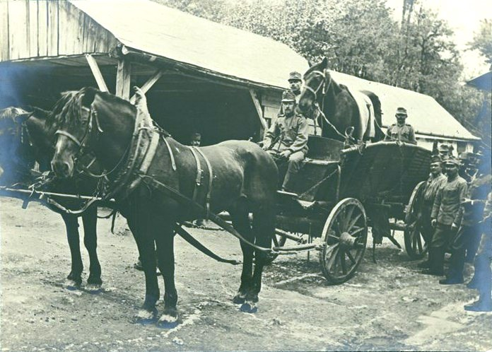 Снимка на транспорт на болен кон на австро-унгарската армия.